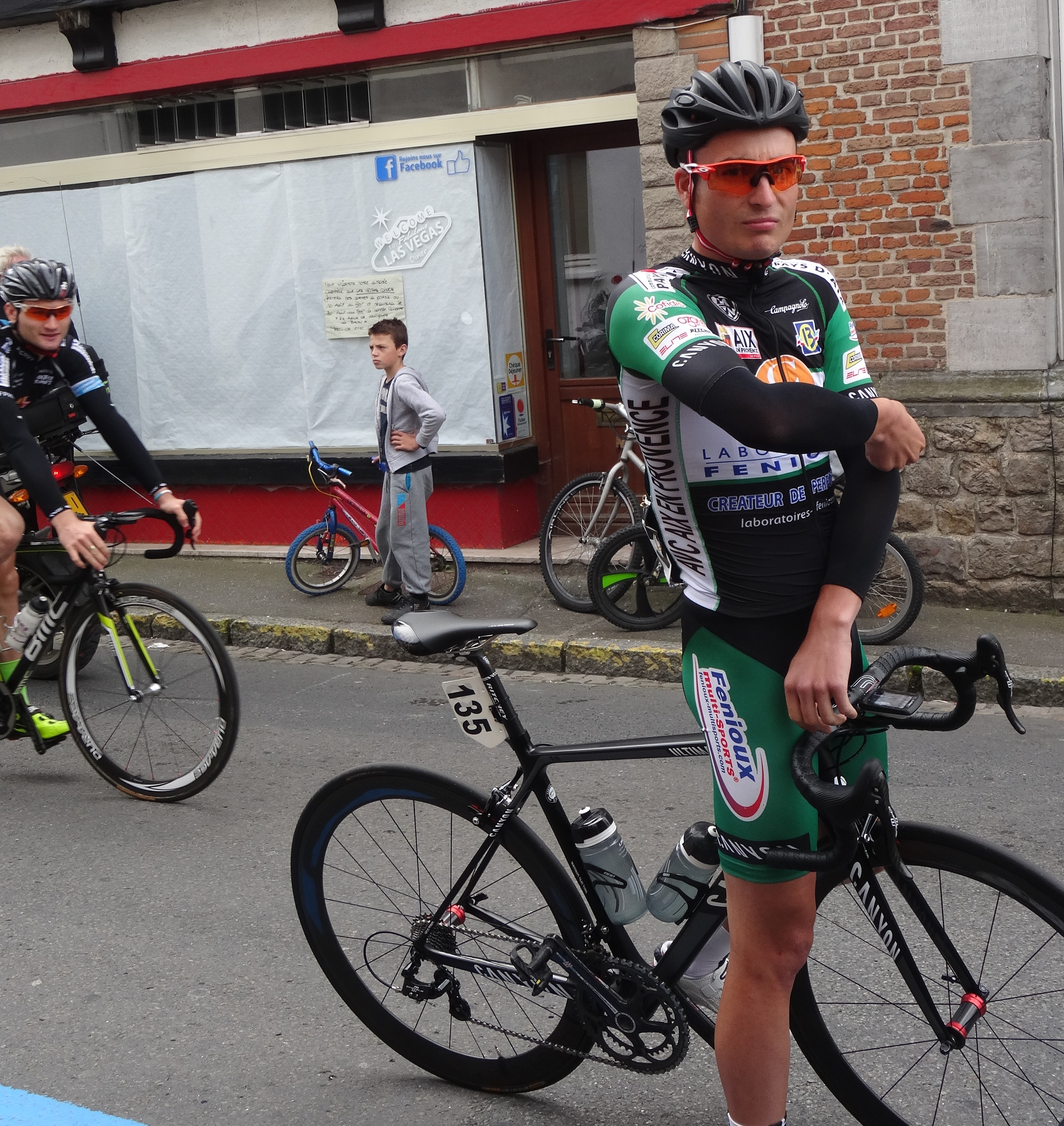 Reportage photographique réalisé le dimanche 17 août à l'occasion du départ et de l'arrivée du Grand Prix de Bavay 2014 à Bavay, Nord, Nord-Pas-de-Calais, France.